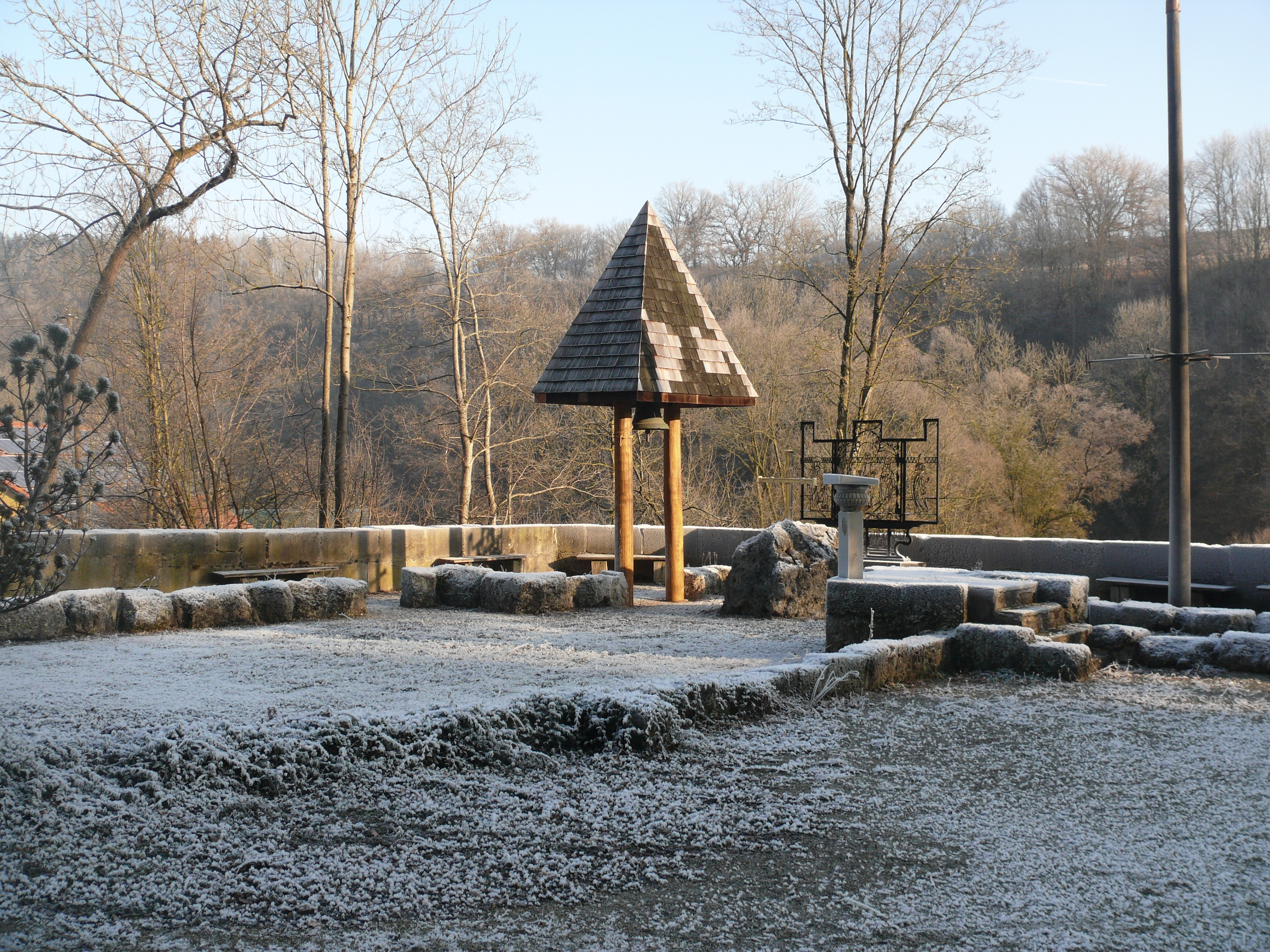 ehemalige Kirch Anhausen, Sulzdorf